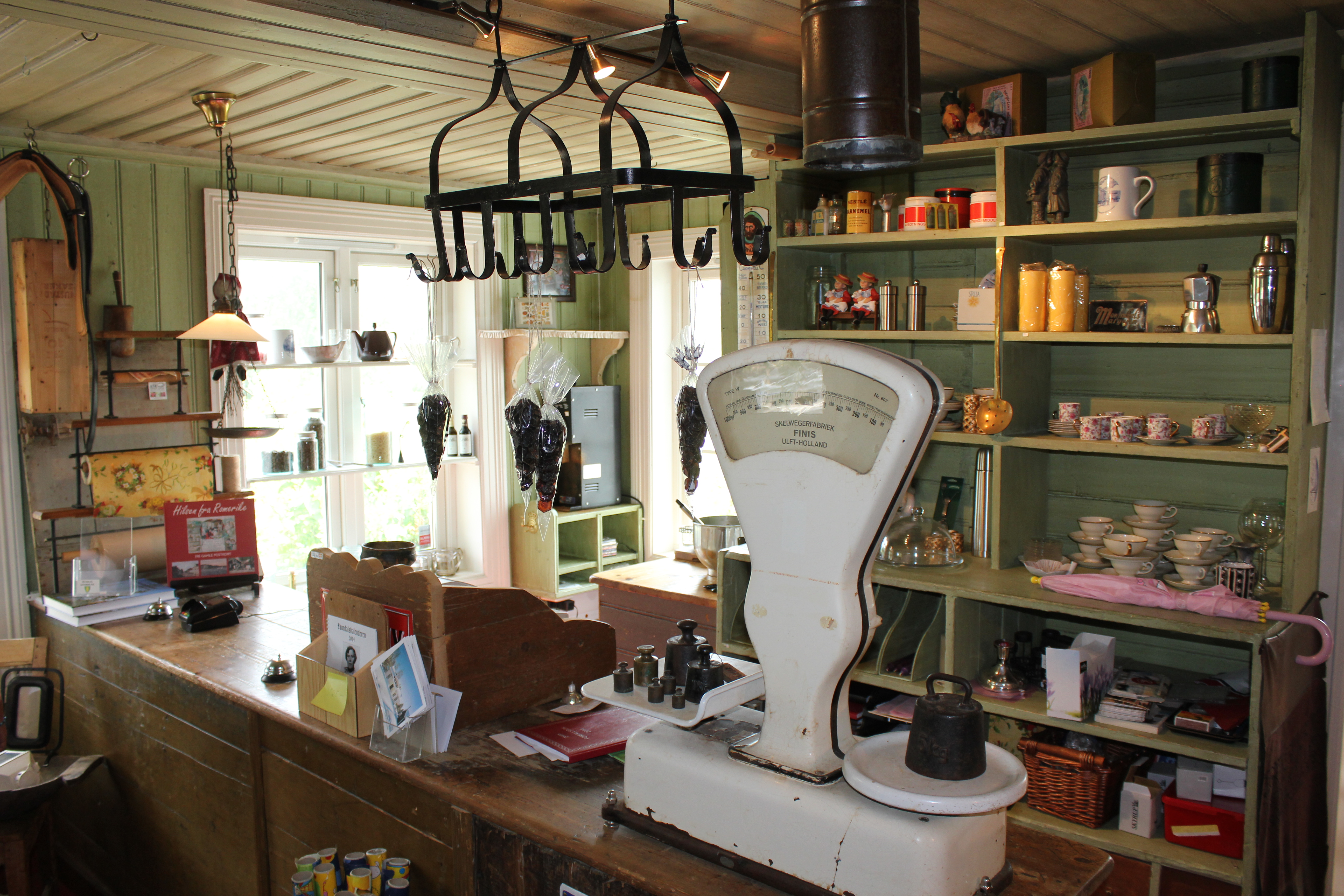 Molstad Landhandleri i Hurdal - interiør